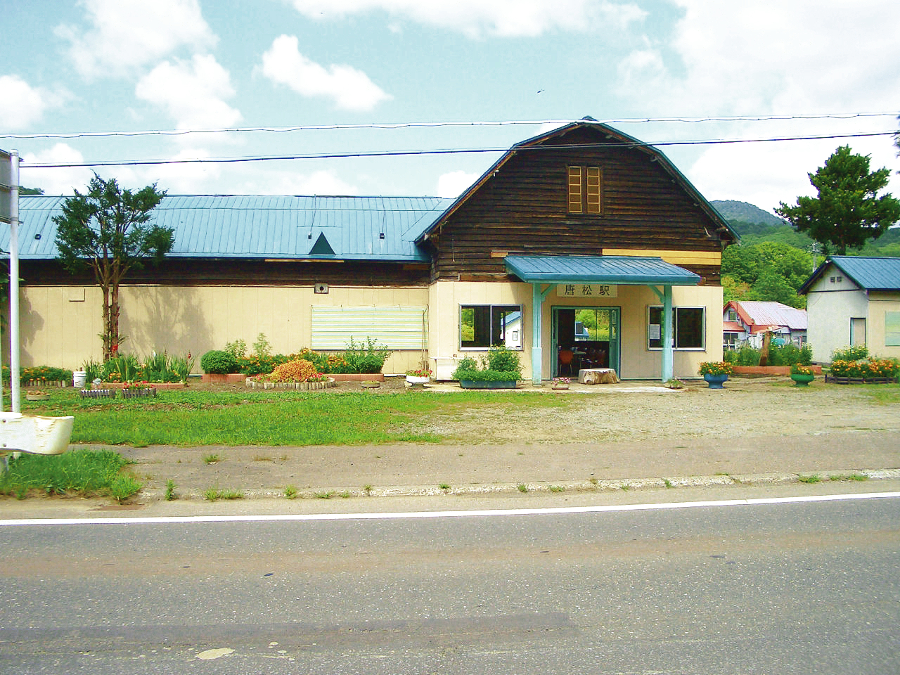 Mikasa city, Hokkaido, Japan